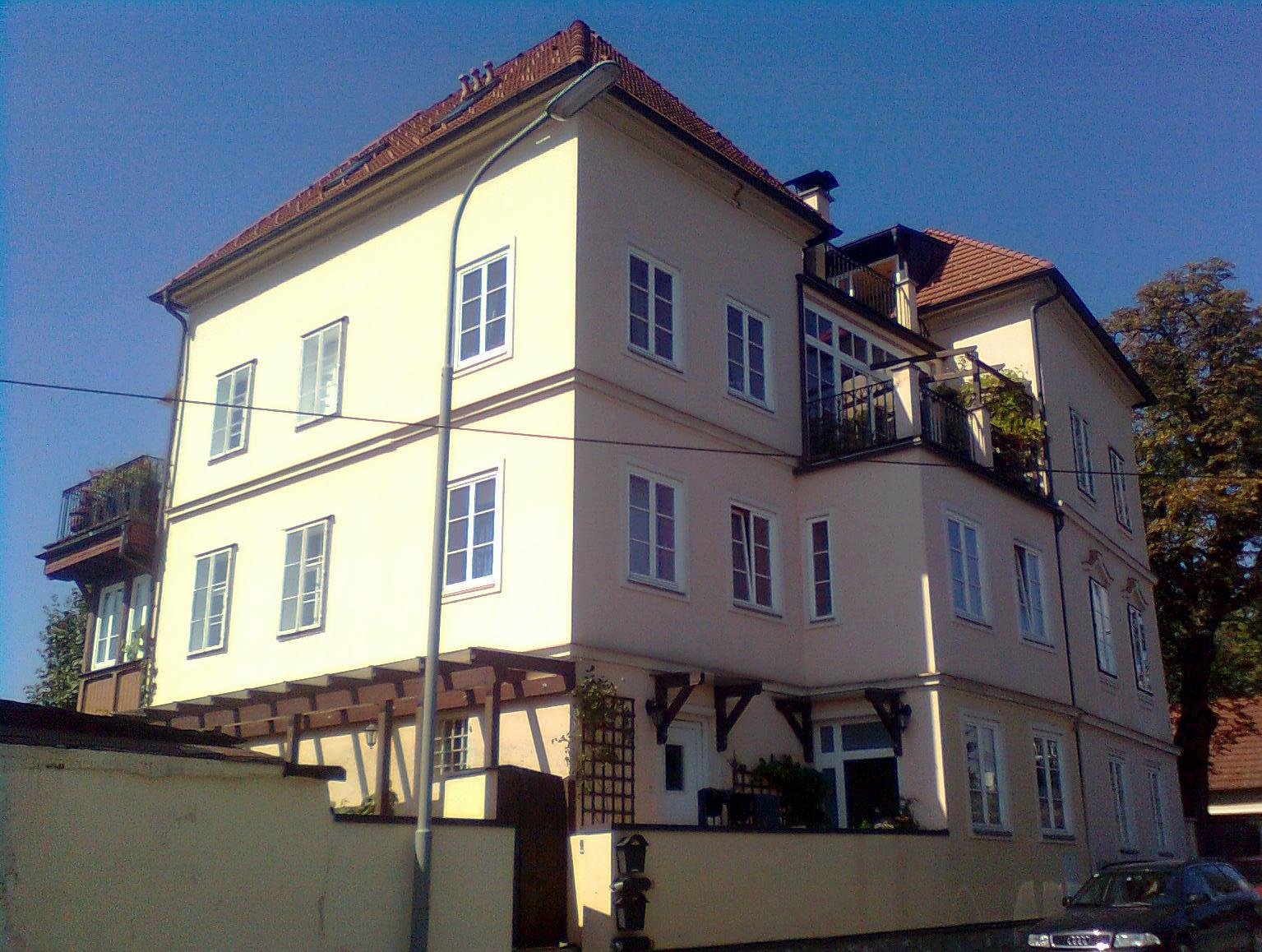 Hubertus-Schlössl, Graz